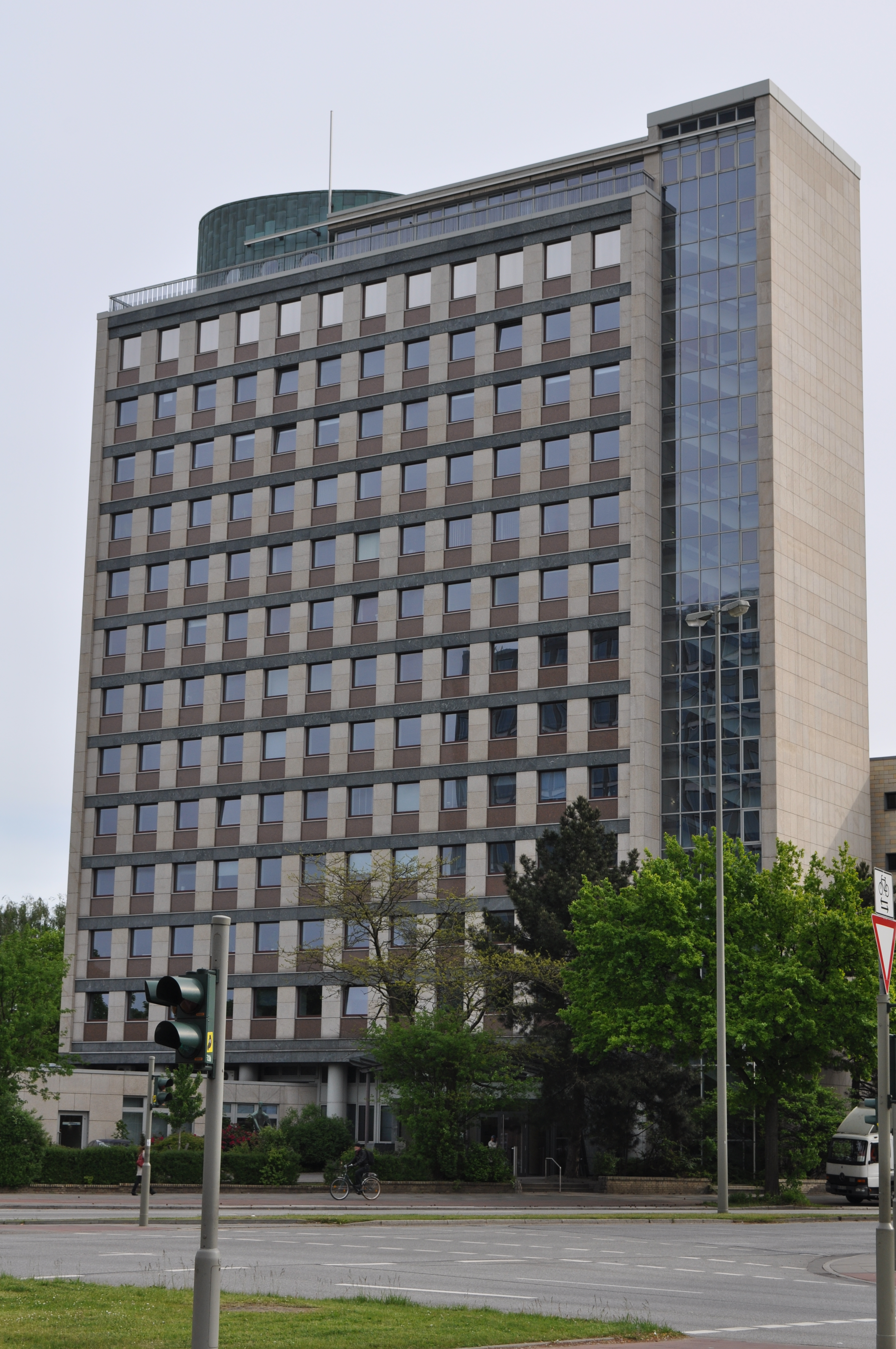 Blick von Südwesten auf das Bürogebäude Lübecker Straße 1 im Hamburg-Hohenfelde. Gebaut 1955/56 als Hauptverwaltung der Neuen Heimat (Entwurf Ernst May), wurde das Gebäude inzwischen modernisiert und in Alster-Tower umbenannt. Sitz des Konsulats der Tunesischen Republik und des Honorarkonsulats der Republik Ghana.